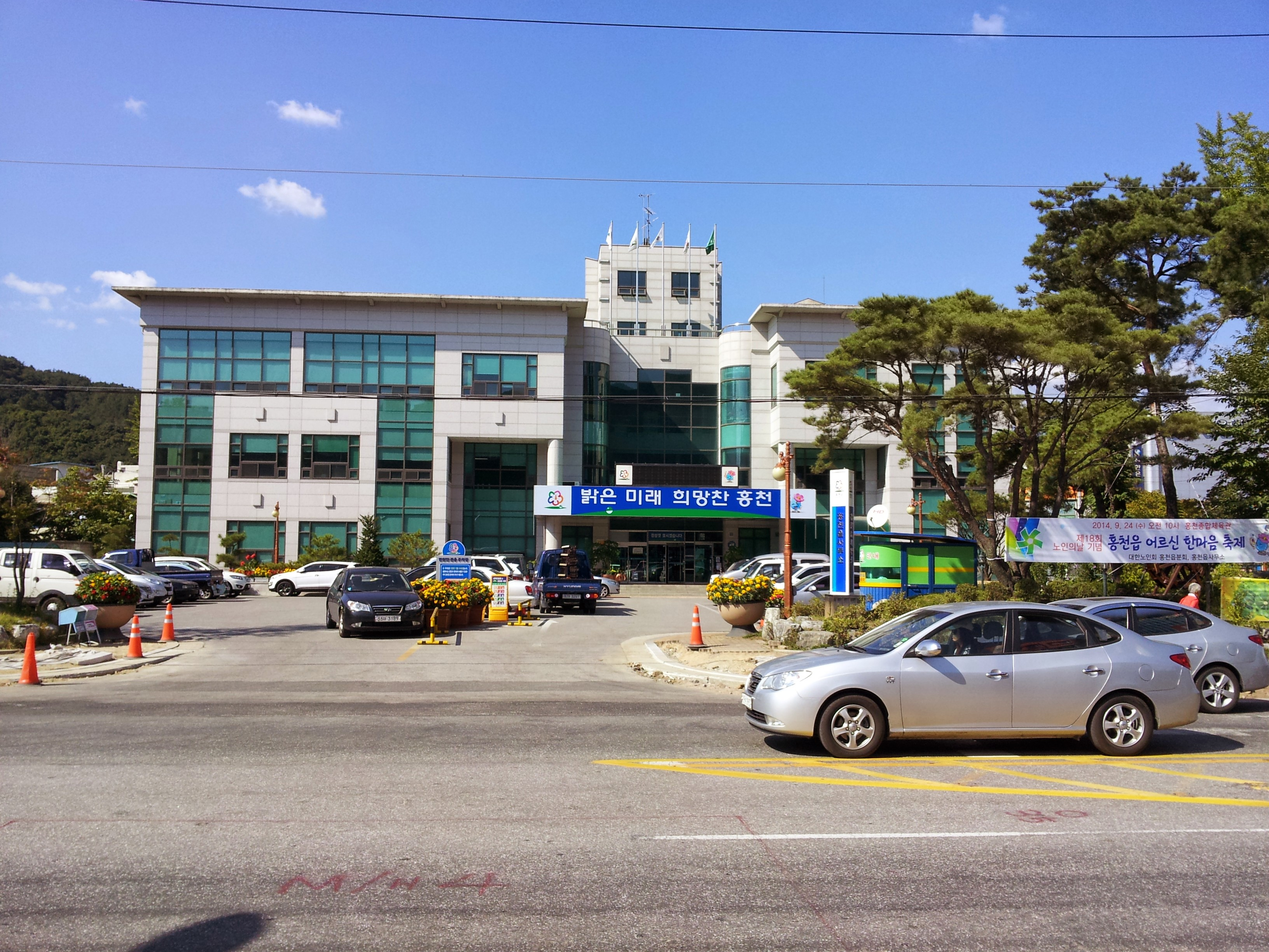 홍천읍사무소의 전경.